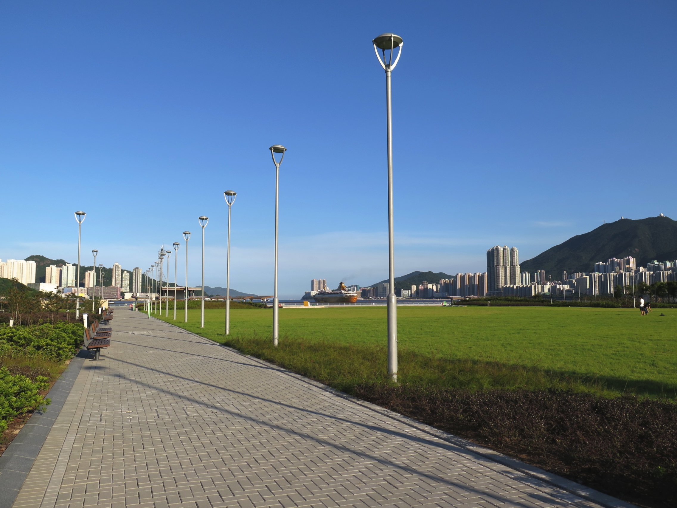 Kai Tak Runway Park